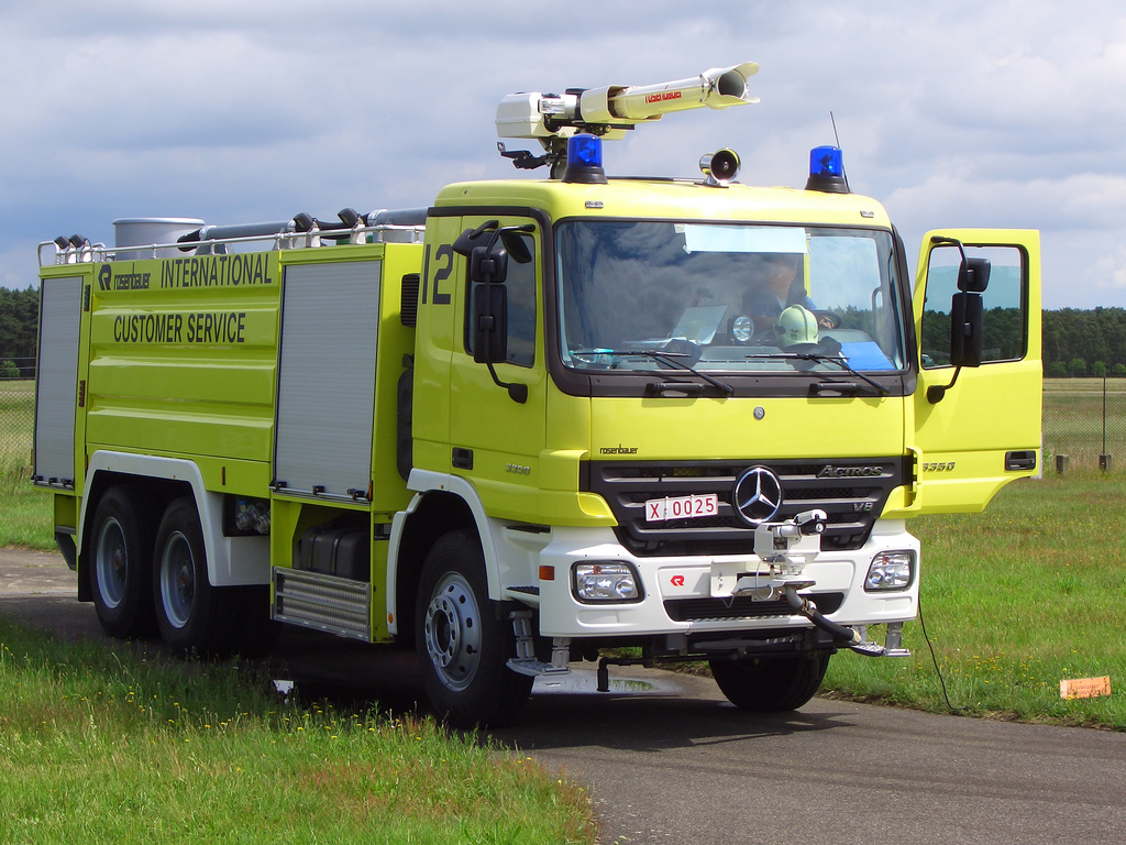 Ein Flugfeldlöschfahrzeug auf Mercedes-Benz Actros-Basis.